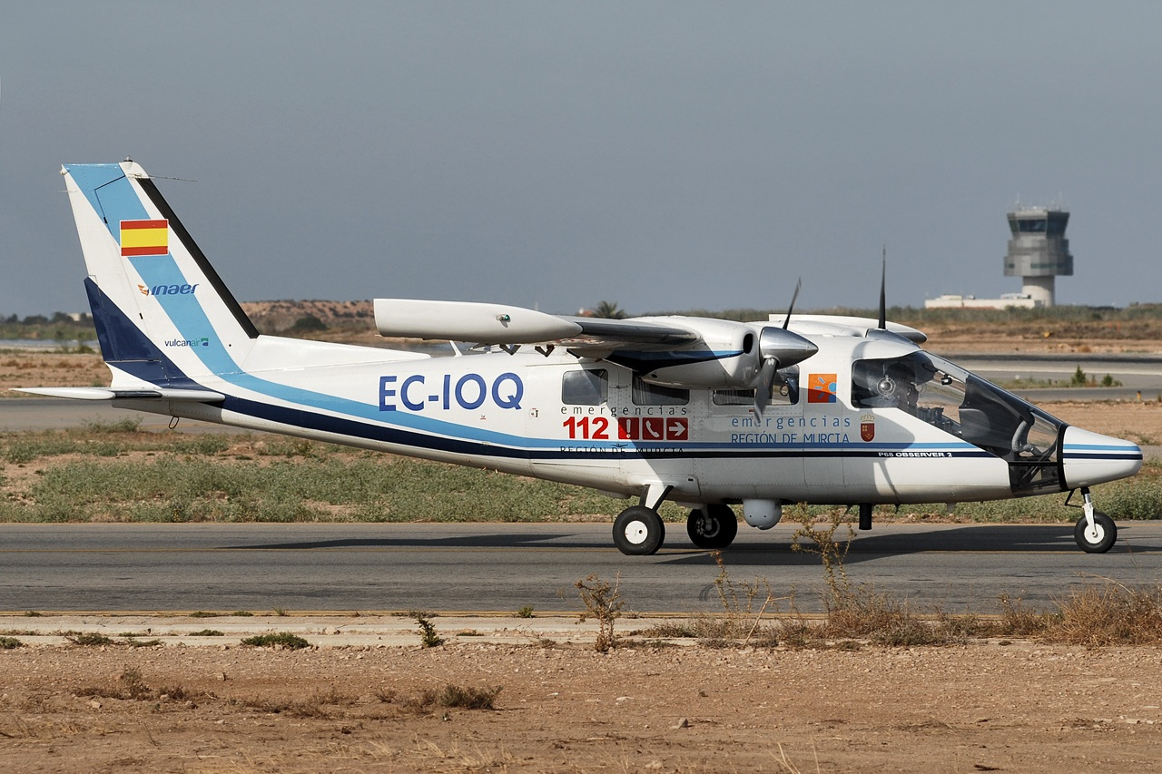 Partenavia P.68 EC-IOQ (cn 422-22/OB2) Murcia - San Javier (MJV / LELC), Spain July, 2009